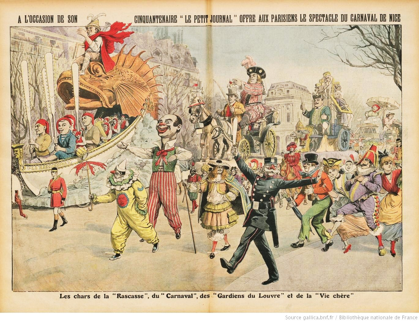 Les chars de la Rascasse, du Carnaval, des Gardiens du Louvre et de la Vie chère venus de Noce à Paris défiler le jour de la Mi-Carême 1912. pages 84-85.